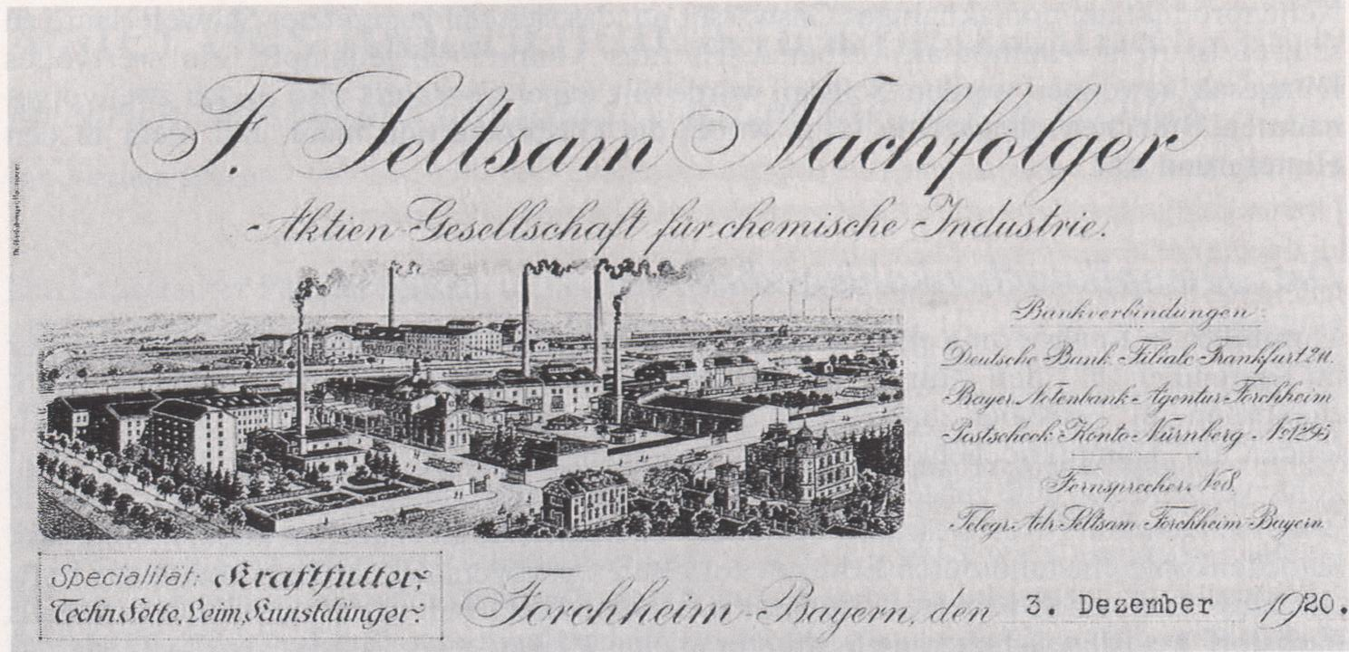 Friedrich Seltsam, Leimfabrikant und Erfinder, Grünstadt, Forchheim